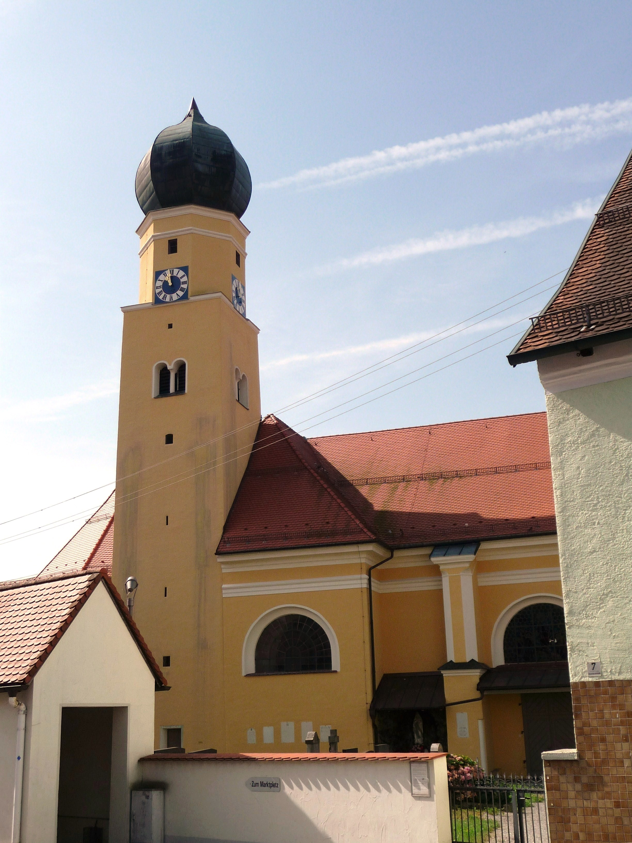 Die katholische Pfarrkirche St. Martin in Schwarzach